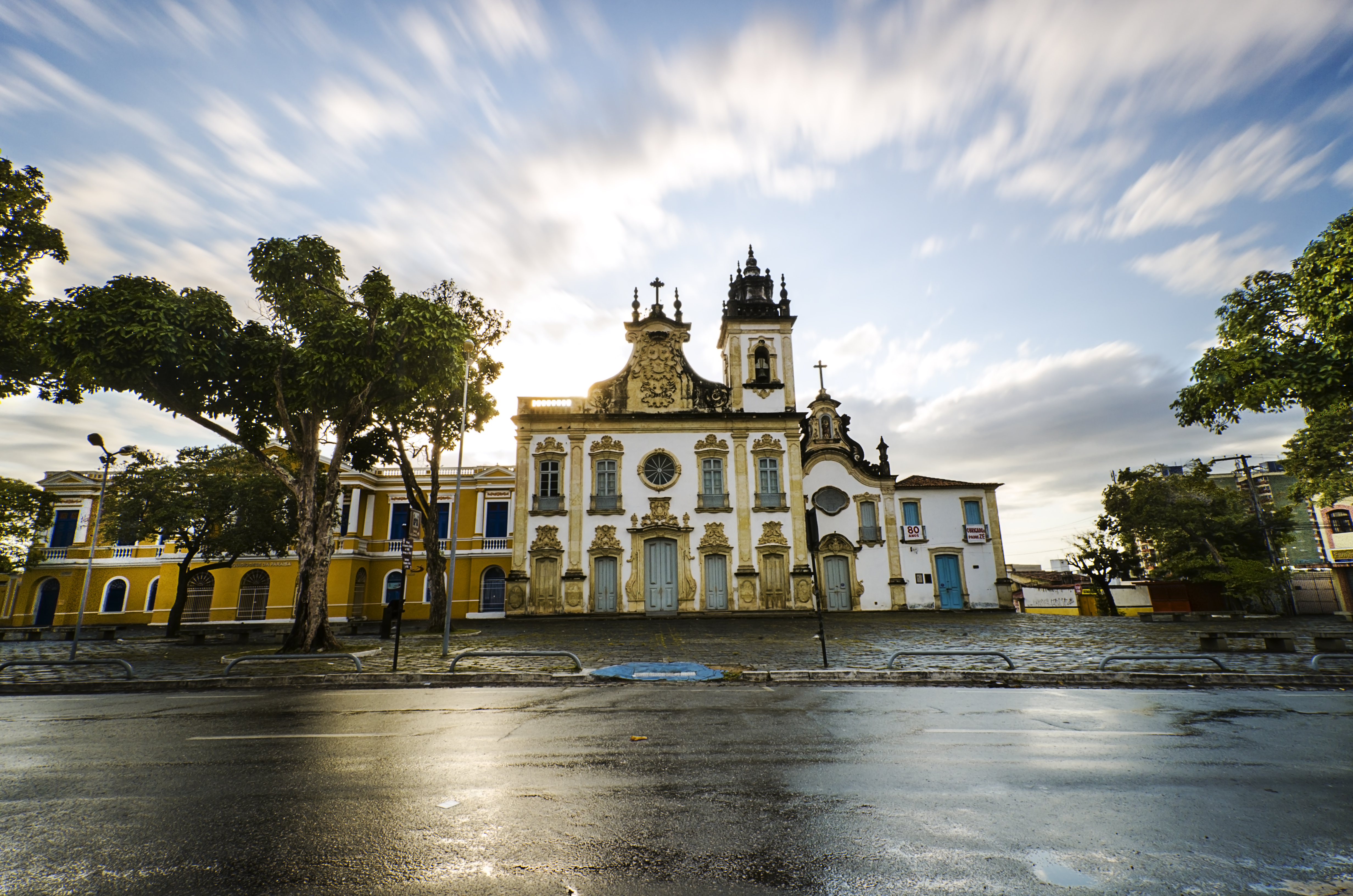 Igreja da Ordem Terceira do Carmo